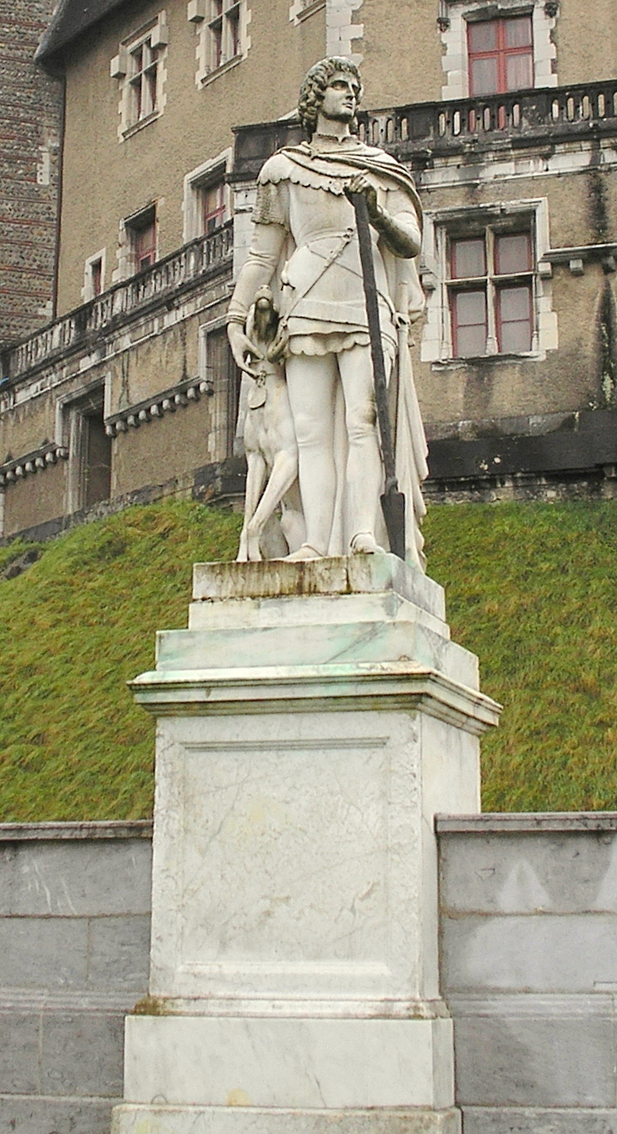 Statue de Gaston Phoebus, à l'extérieur de château de Pau